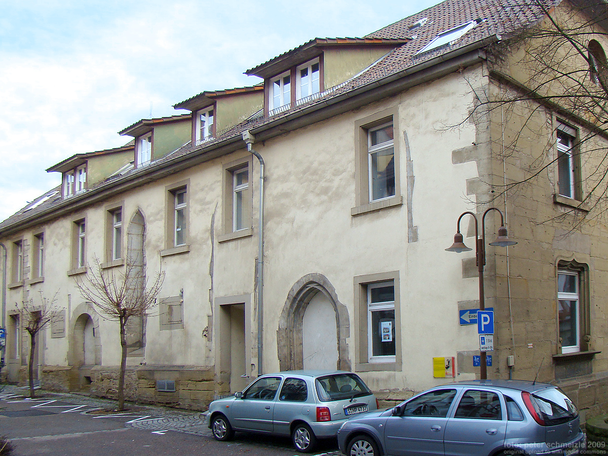 Ehem. Peterskirche in Eppingen